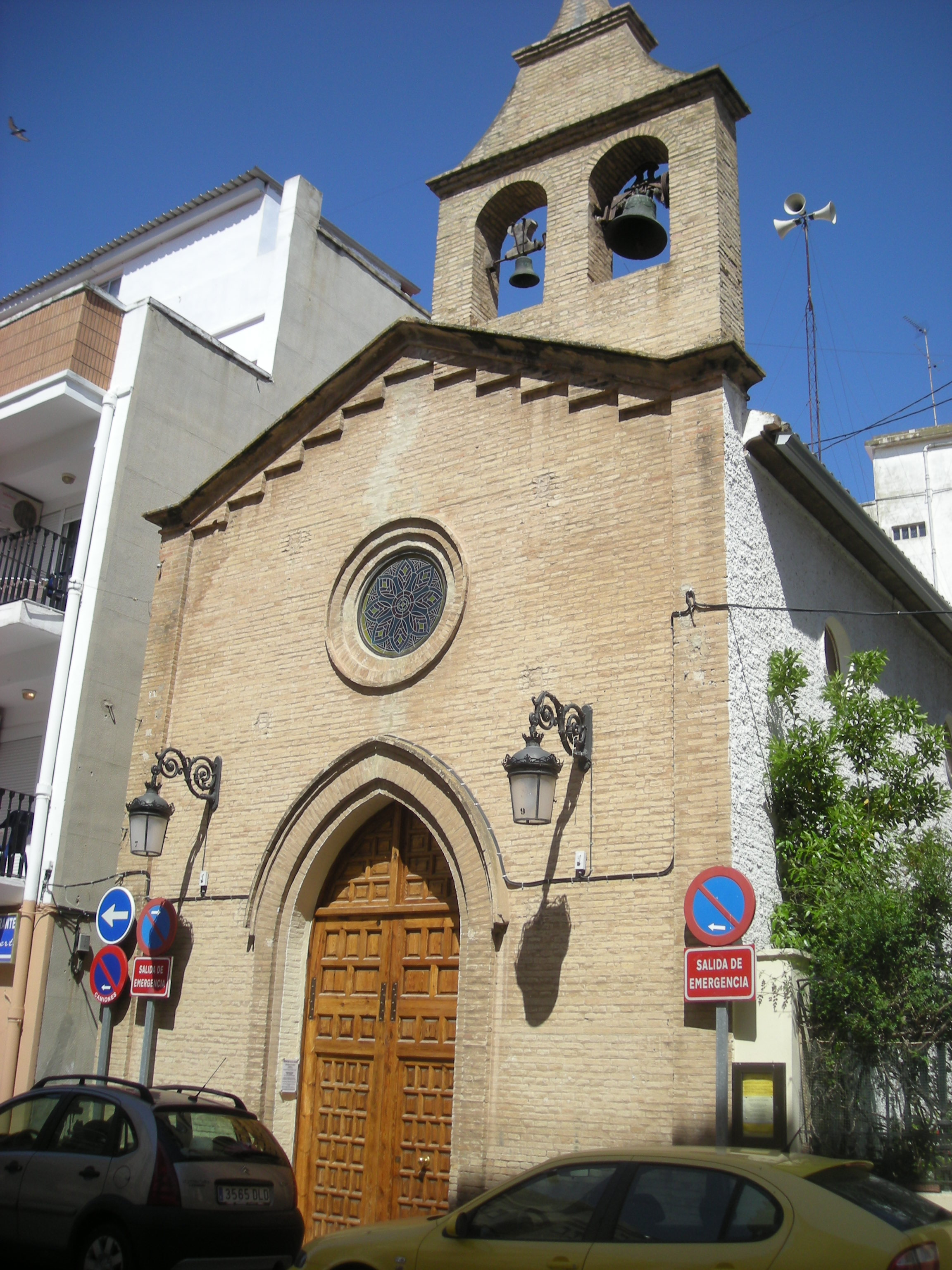 Església parroquial de Sant Josep del Saler (València).